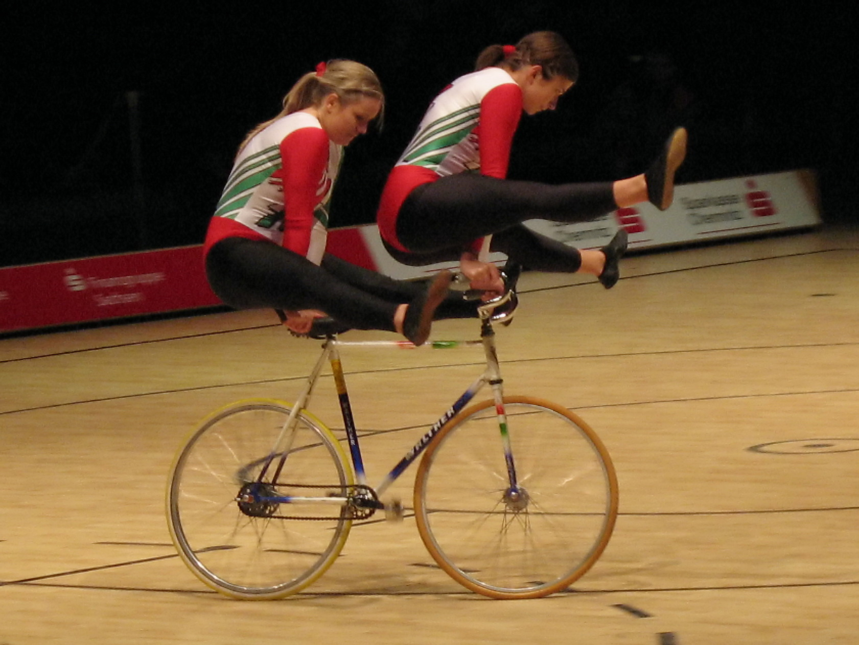 Artistic cycling competition at the UCI Indoor Cycling World Championships 2006 in Chemnitz (Germany)